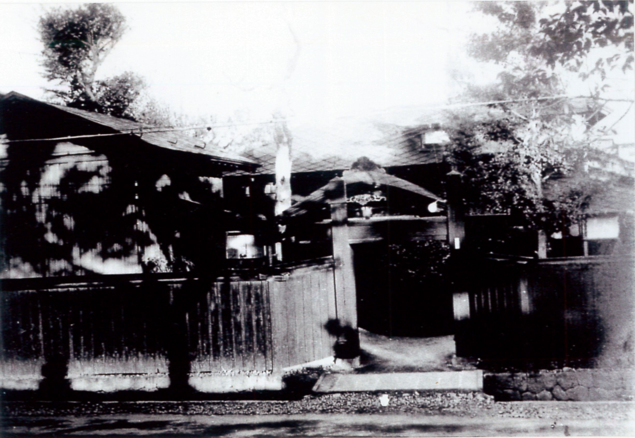 秋田市土手長町にあった二木謙三の生家